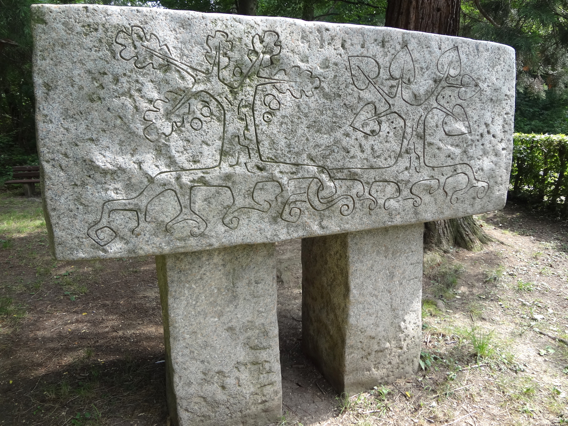 Gedenkstein Karlstein (Strümpfelbach) 1973